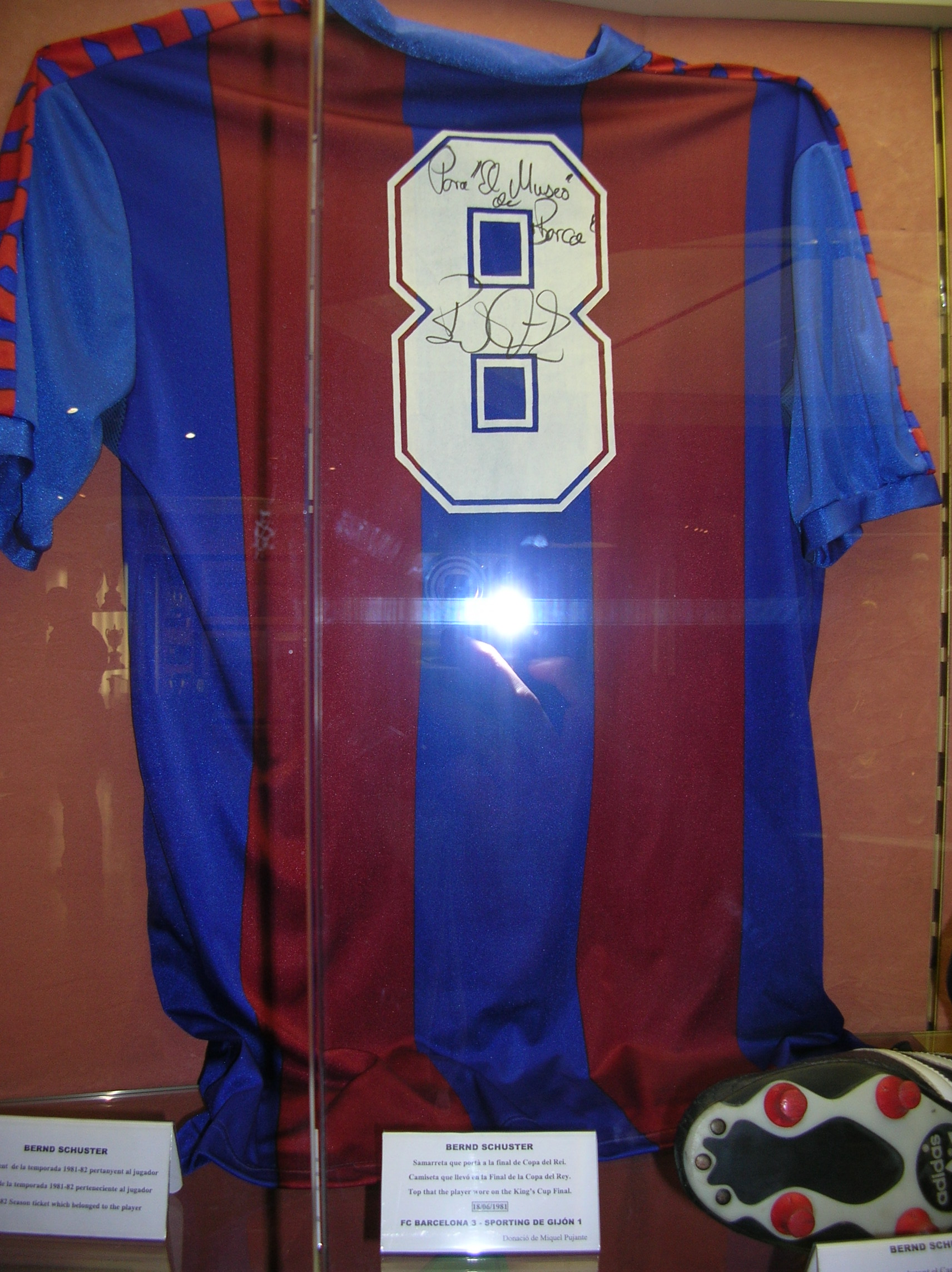 Trikot von Bernd Schuster, das er am 18.06.1981 im Finale der Copa del Rey trug